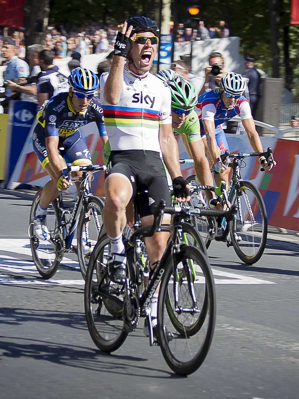 Joie de Mark CAVENDISH Lors de sa victoire sur la 20e et dernière du tour de France 2012 (4e victoire sur le Champs Elysées) - 20e étape du Tour de France 2012, arrivée sur les champs Elysées à Paris lors de la dernière étape entre Rambouillet et paris les Champs Elysées le dimanche 22 juillet 2012 - © William Morice / MaxPPP